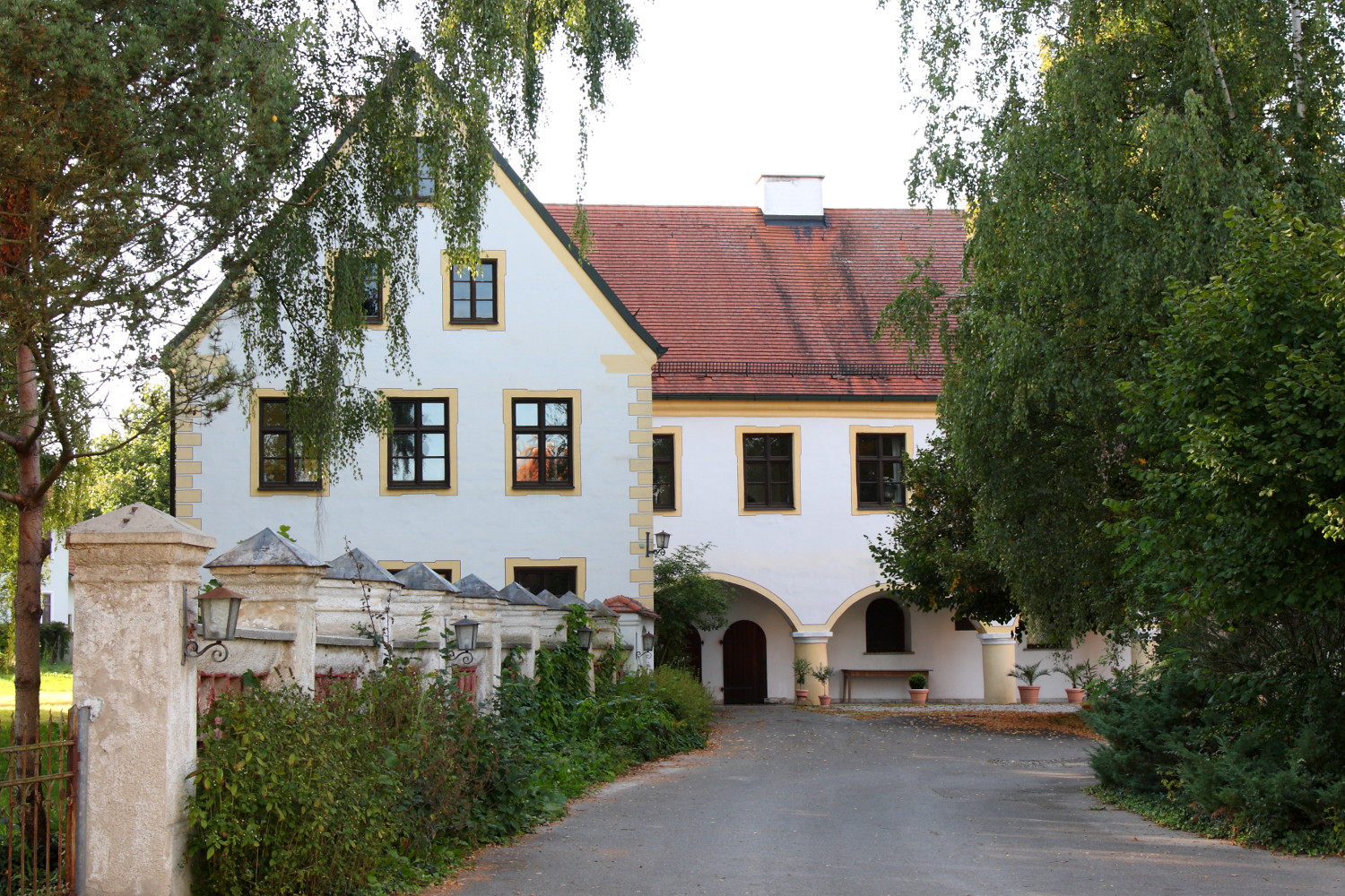 zweiflügeliger Hauptbau mit Arkaden, 1571; Wappentafel, bez. 1571; im Garten Pfeilermauer mit Backsteinornamentik, 18. Jahrhundert; Einfriedungsmauer, 18. Jahrhundert; Hoftor nach Osten, 18. Jahrhundert; Ostflügel (Stallgebäude), 1. Hälfte 19. Jahrhundert; Mörtelplastik (Erntefuhrwerk) am Nordflügel, um 1880.This is a photograph of an architectural monument.